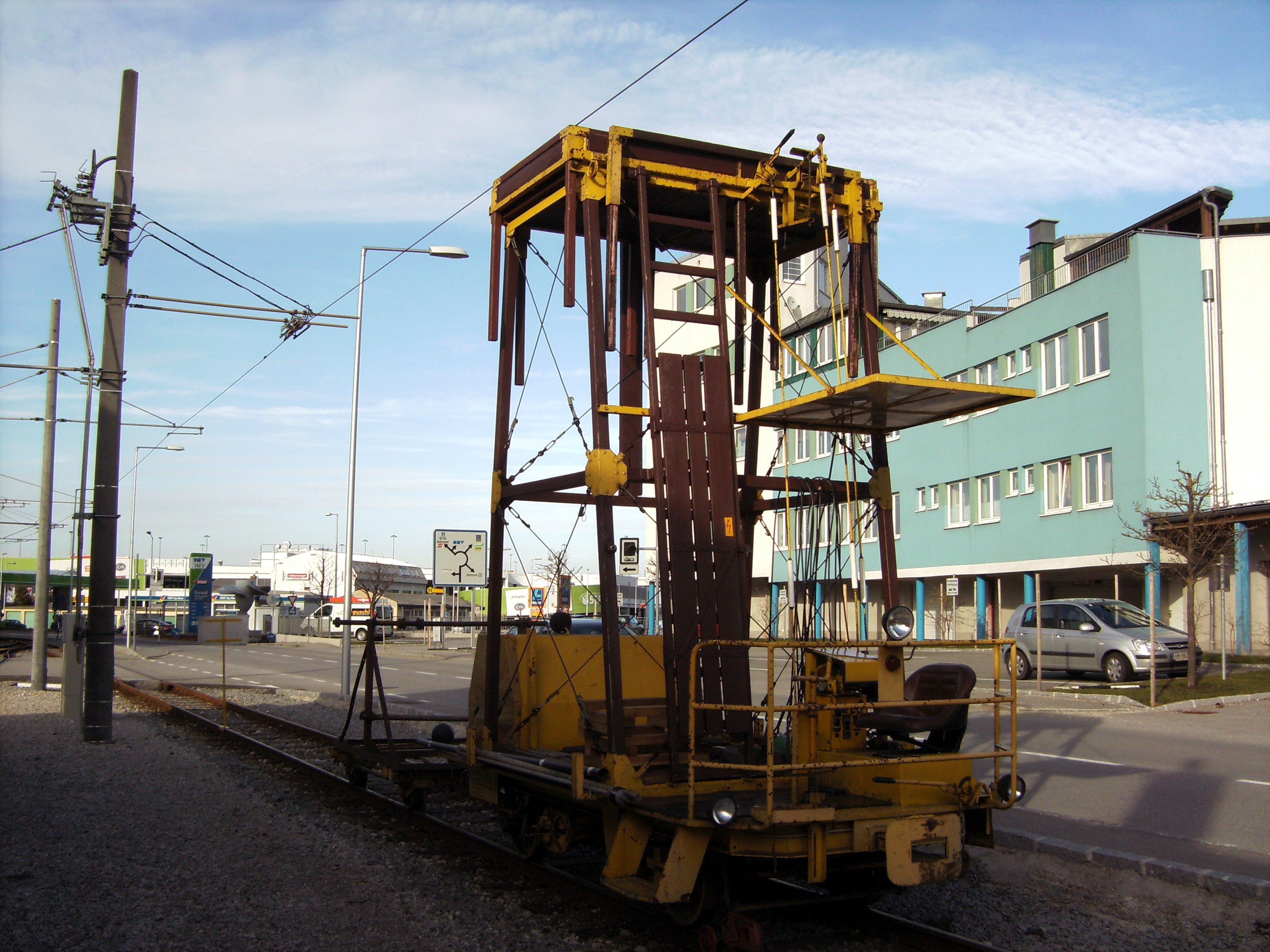 Turmwagen X 23.641 und Hilfswagen GM 602 neben der Remise der Straßenbahn Gmunden